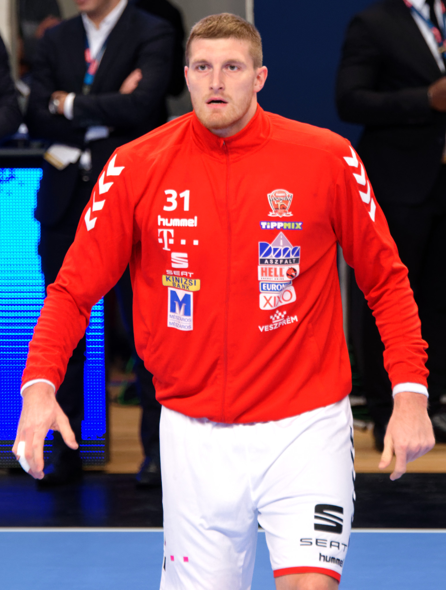 Rencontre de phase de groupe de la ligue des champions 2017/18 entre le PSG et Veszprem. A Coubertin, le 12 novembre 2017.